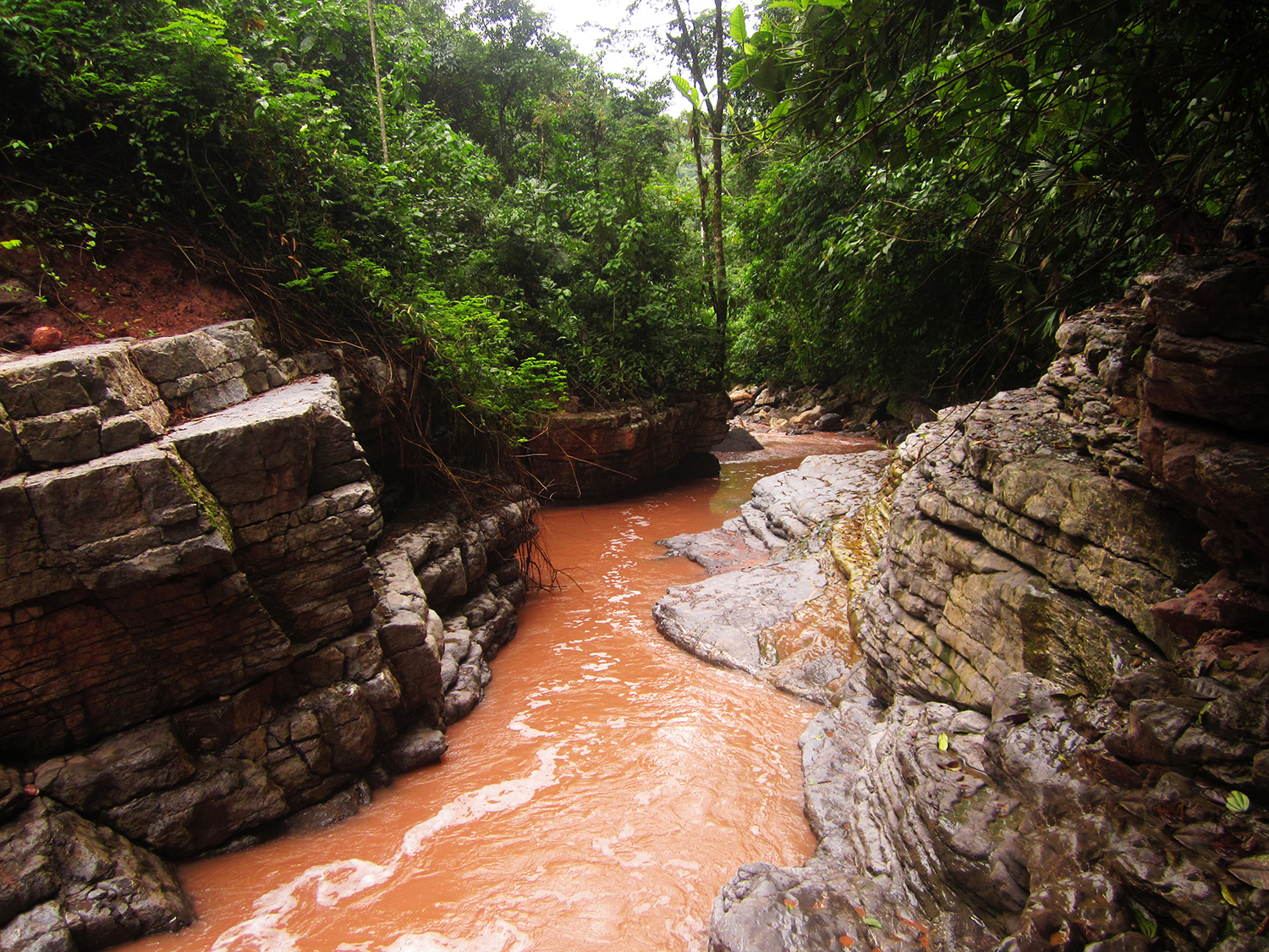 Cascada Escalera 2